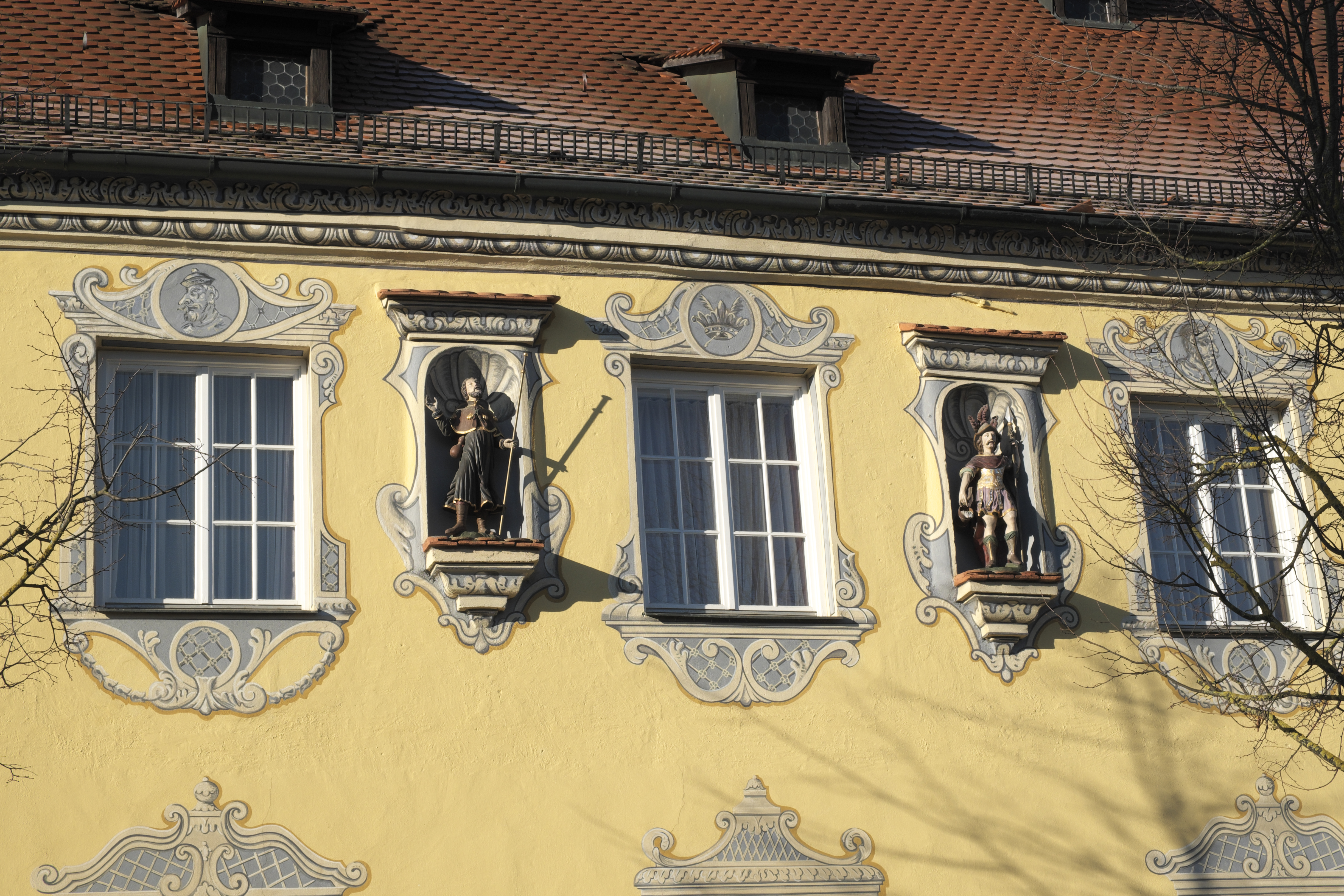 Gasthaus Zur Krone in Berkheim im Landkreis Biberach (Baden-Württemberg/Deutschland)